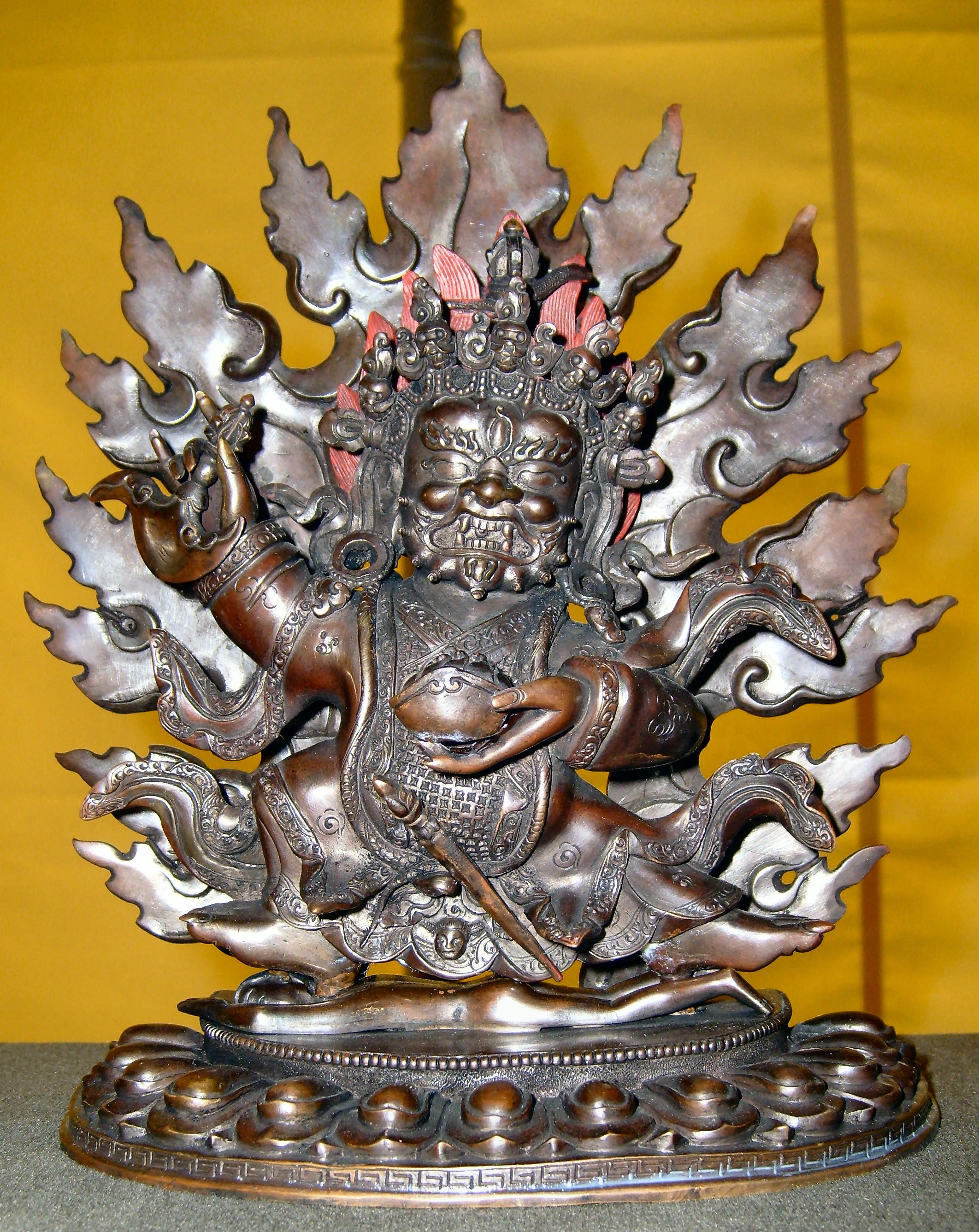 Mahakala - powerfull guard in Tibetan buddhism